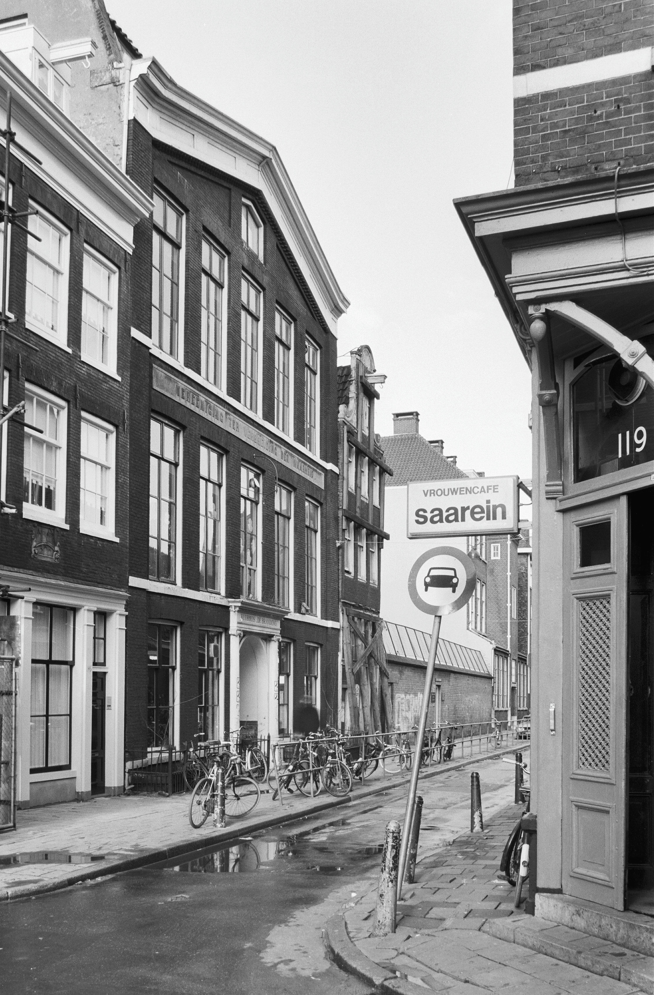 voorgevel